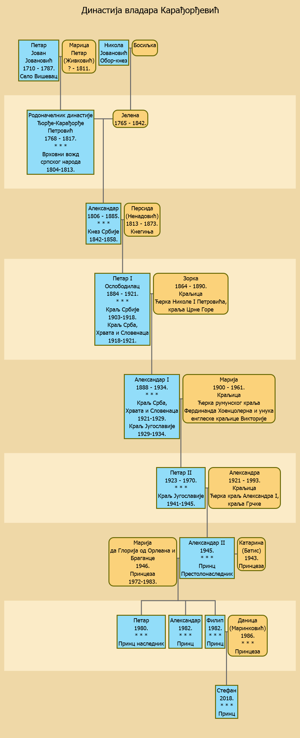 Српски (ћирилица): Породично стабло пунородних директних сродника династије Карађорђрвић.